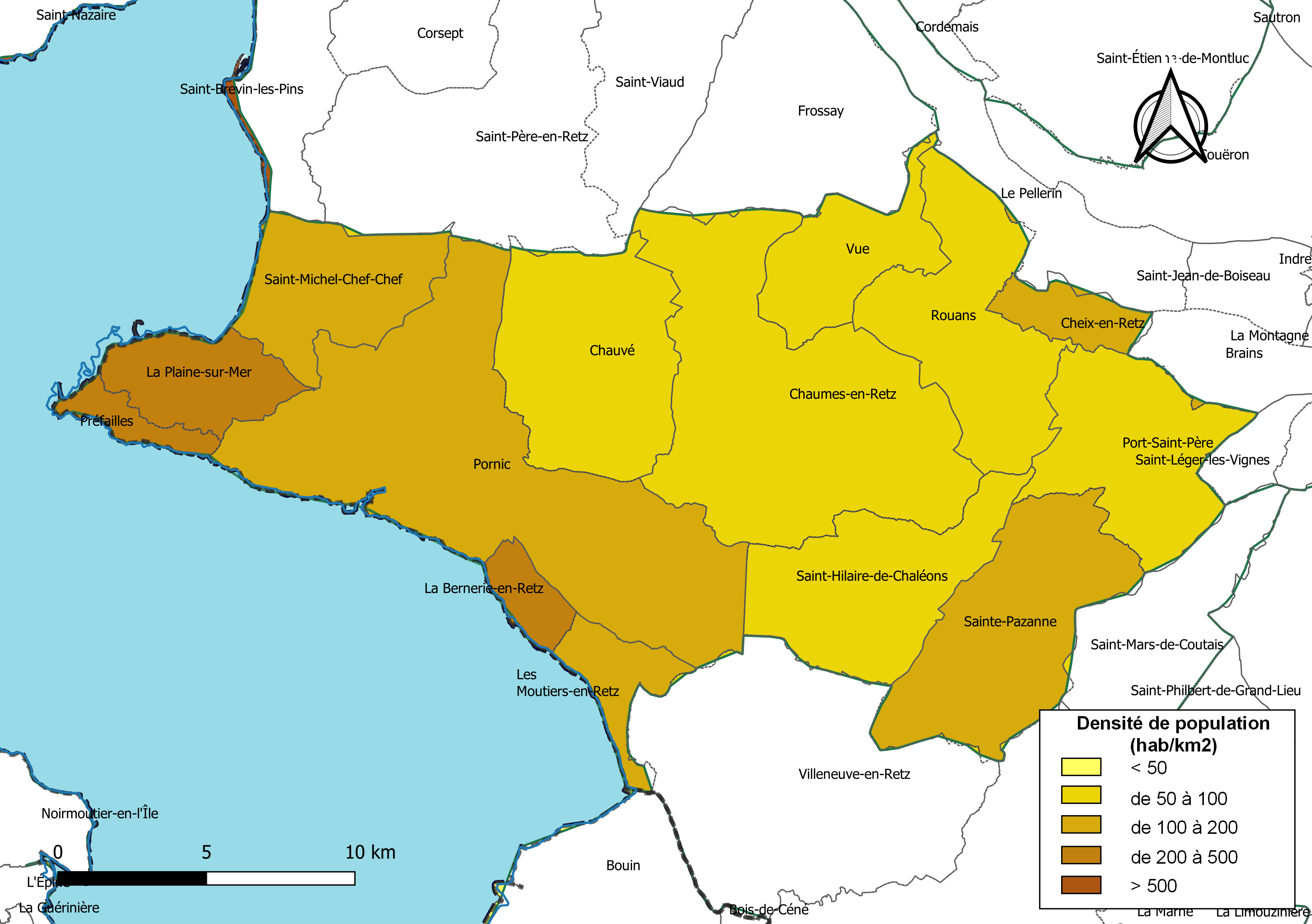 Carte des densités de population (millésimée 2016) des communes de l'intercommunalité Pornic Agglo Pays de Retz, département de la Loire-Atlantique, France. Composition au 1er janvier 2019.